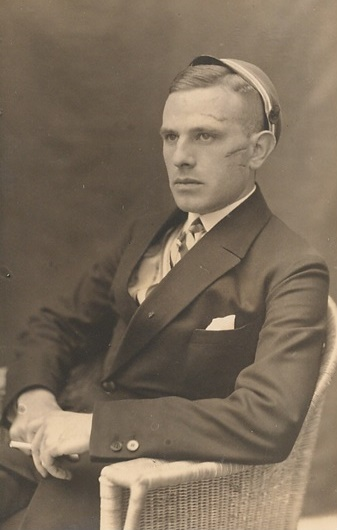 Porträtfotografie von Georg Tartler